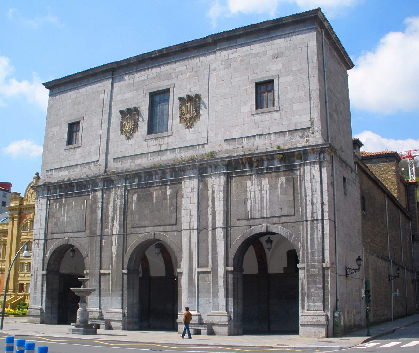 Iglesia de San Francisco (Tolosa, Guipúzcoa)